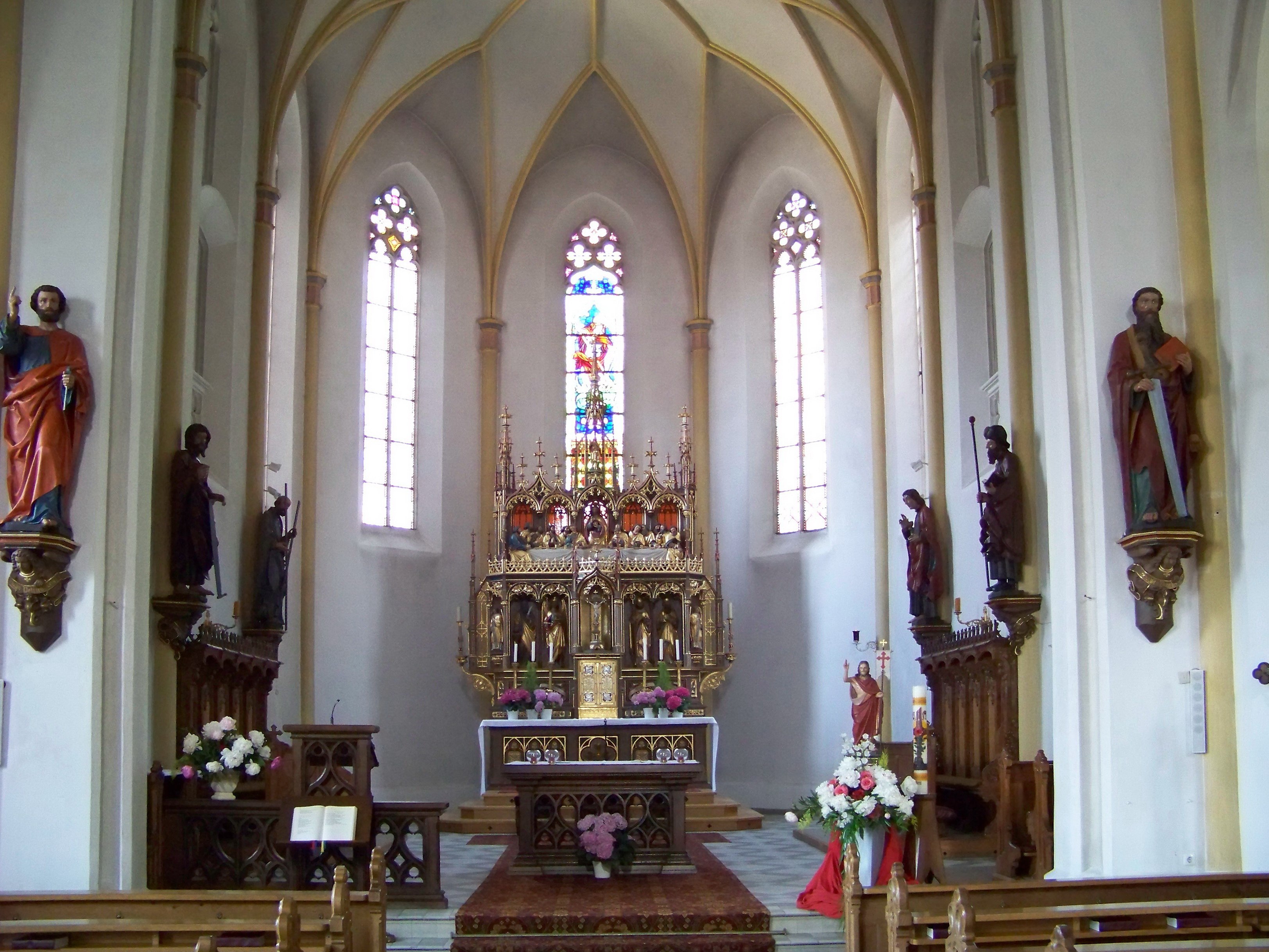 Rottenburg an der Laaber. Katholische Pfarrkirche St. Georg. Chorraum mit Hochaltar. Seitlich am Chorbogen St. Petrus u. St. Paulus.